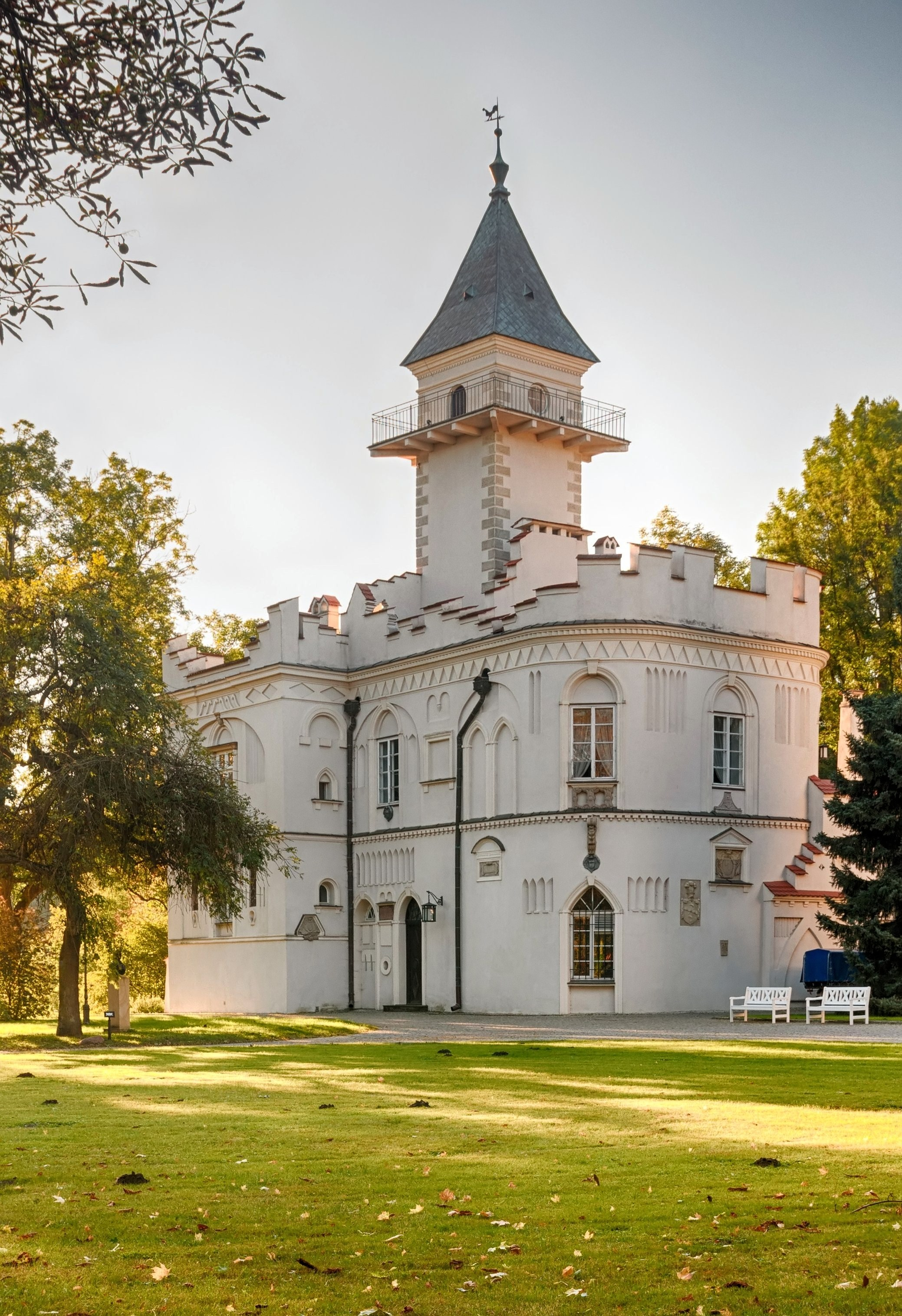 zespół pałacowy, XVI, XVII-XIX: pałac, nr rej.: 150/32/58 z 20.06.1958 dwór, nr rej.: 756 z 22.03.1966 stajnia, nr rej.: 762 z 1.12.1966 Radziejowice, Radziejowice